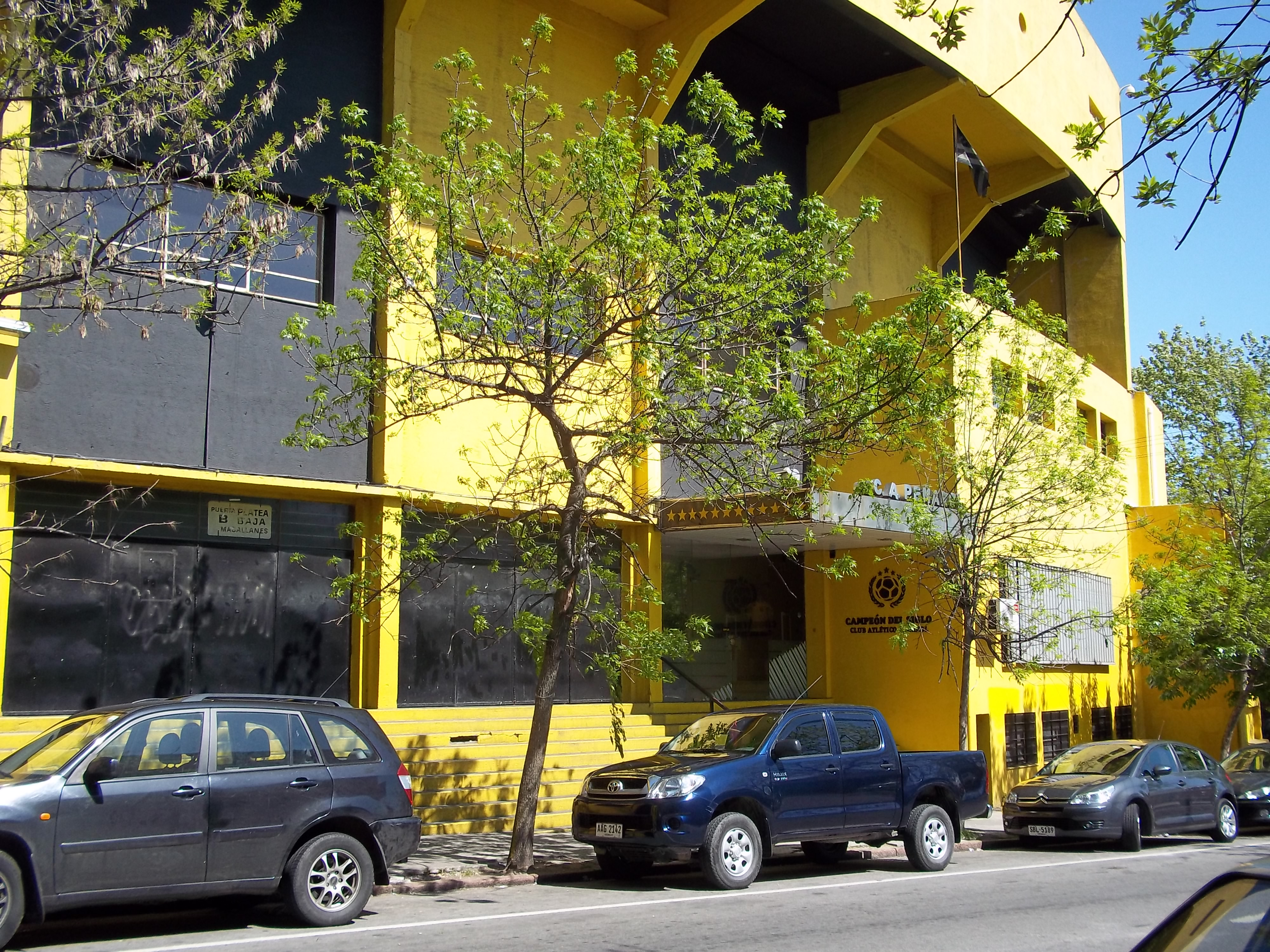 Estadio Contador Gastón Guelfi, también llamado Palacio Peñarol, es el escenario deportivo (básquetbol) del Club Atlético Peñarol. En la imagen, el acceso de la calle Magallanes, Montevideo, Uruguay. También es el ingreso a la sede social del club.